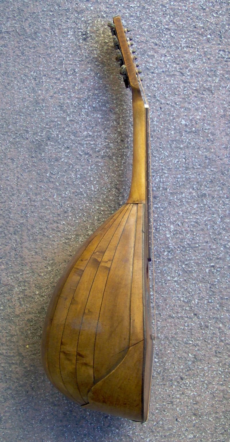 neapolitan mandolin, side view